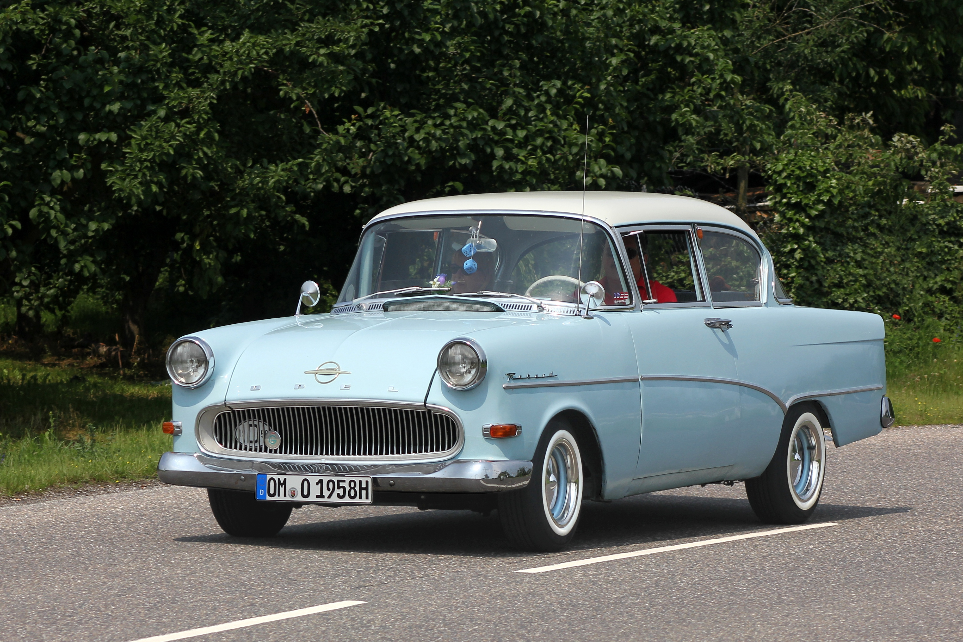 Opel Rekord P1, Baujahr 1958, Räder nicht serienmäßig (fiktives Kennzeichen)